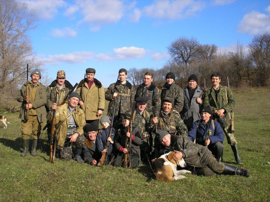 Мисливці села